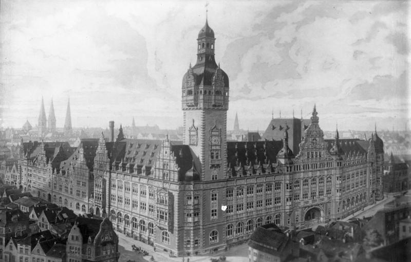 75 Jahre Norddeutsche Lloyd ! Der Norddeutsche Lloyd, das grösste deutsche Schiffahrtsunternehmen wurde am 20. Februar 1857 durch Consul Meier in Bremen gegründet. Die ersten Dampferverbindungen wurden zwischen Bremen und englischen Häfen aufgenommen. Im Jahre 1858 trat der erste deutsche Ozeandampfer des Lloyd die "Bremen" ihre erste Reise nach New York an. Bei Ausbruch des Weltkrieges erreichte die Lloydflotte nahezu 1 Million Brutto-Register-Tons. Infolge der Kriegsverluste und der Auslieferungsbestimmungen des Versailler Vertrages verblieb dem Norddeutschen Lloyd noch ein kläglicher Rest von rund 57.000 Brutto-Register-Tons, welche sie bis zum 1. Januar 1932 wieder auf 959.317 Br.-R.-Tons ausgebaut hat. Von der Gesamttonnage entfallen allein auf die beiden Schnelldampfer "Bremen" und "Europa" 9,5%. Das Hauptverwaltungsgebäude des Norddeutschen Lloyd in Bremen, in welchem seit 1910 die Verwaltung des grössten deutschen Schiffahrtsunternehmen ihren Sitz hat.